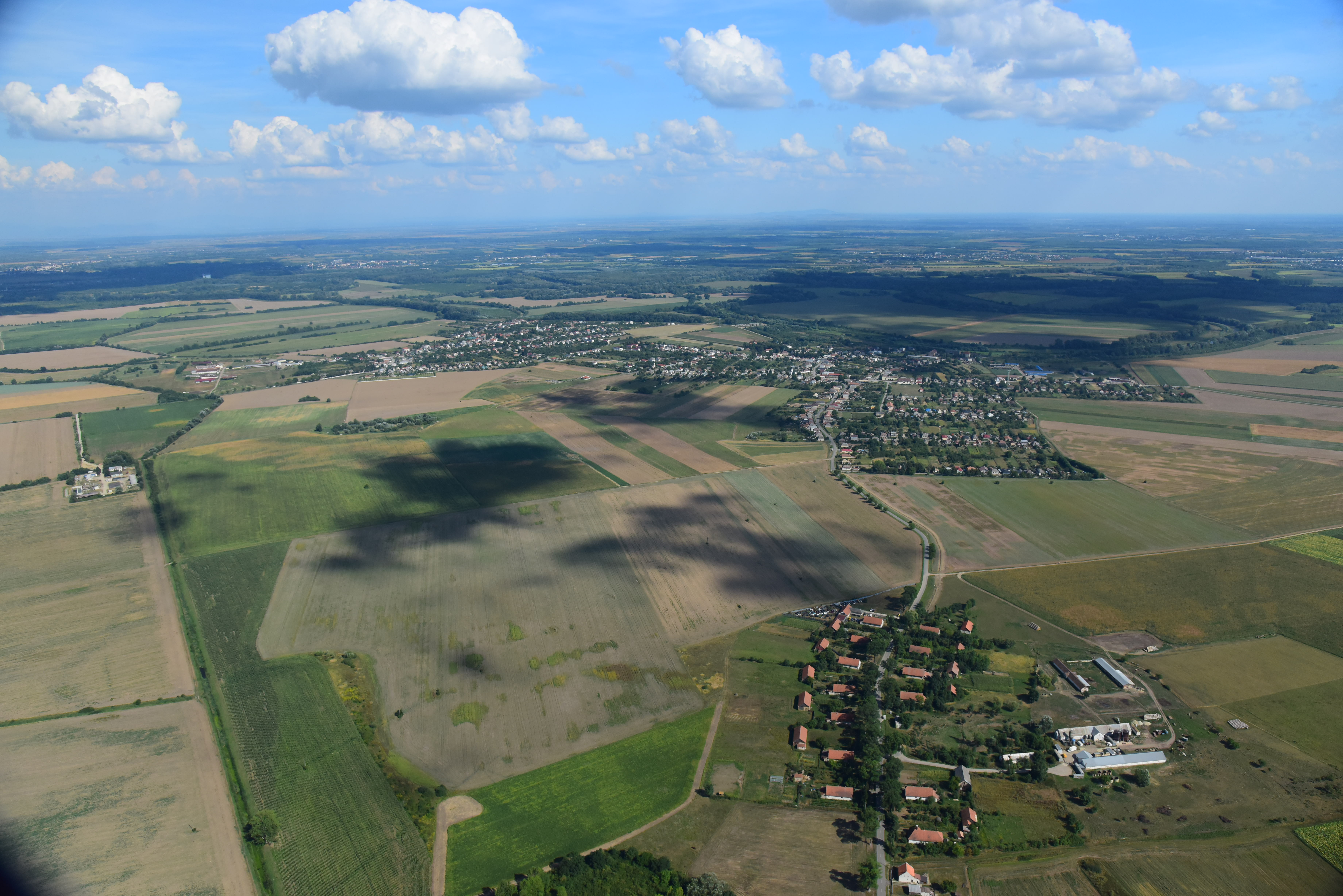 Nagytárkány község légifotó